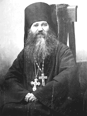 Архимандрит Мелхиседек (Бирев), настоятель муромского Благовещенского монастыря